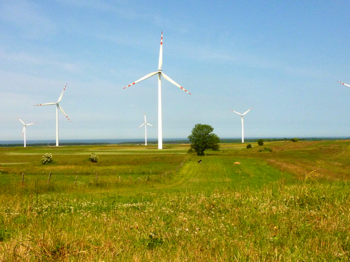 Blick von Zizow (Cisowo) auf die Ostsee. 2010